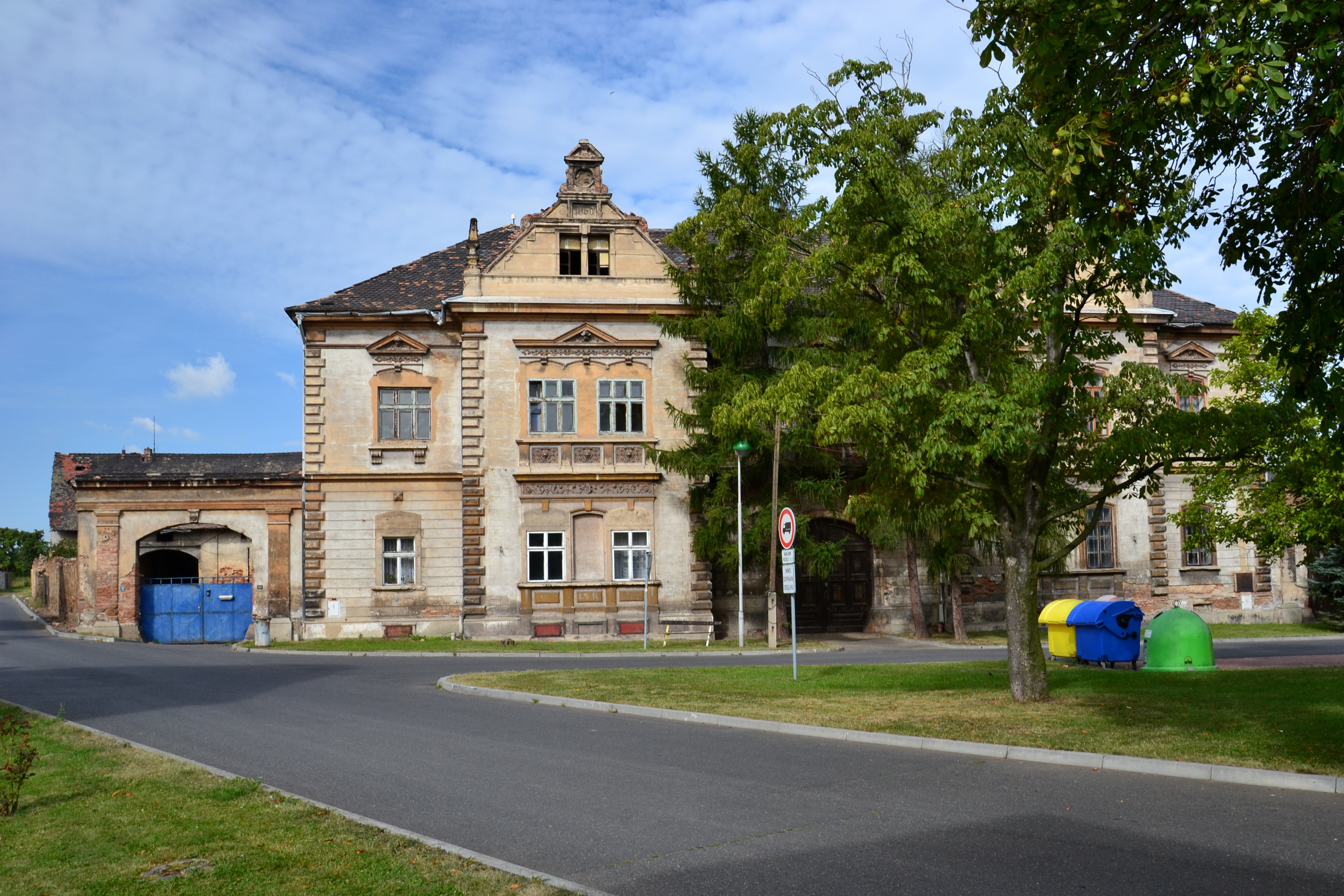 Vrskmaň - usedlost v jihozápadním rohu návsi zvaná Zámeček nebo Herrova vila